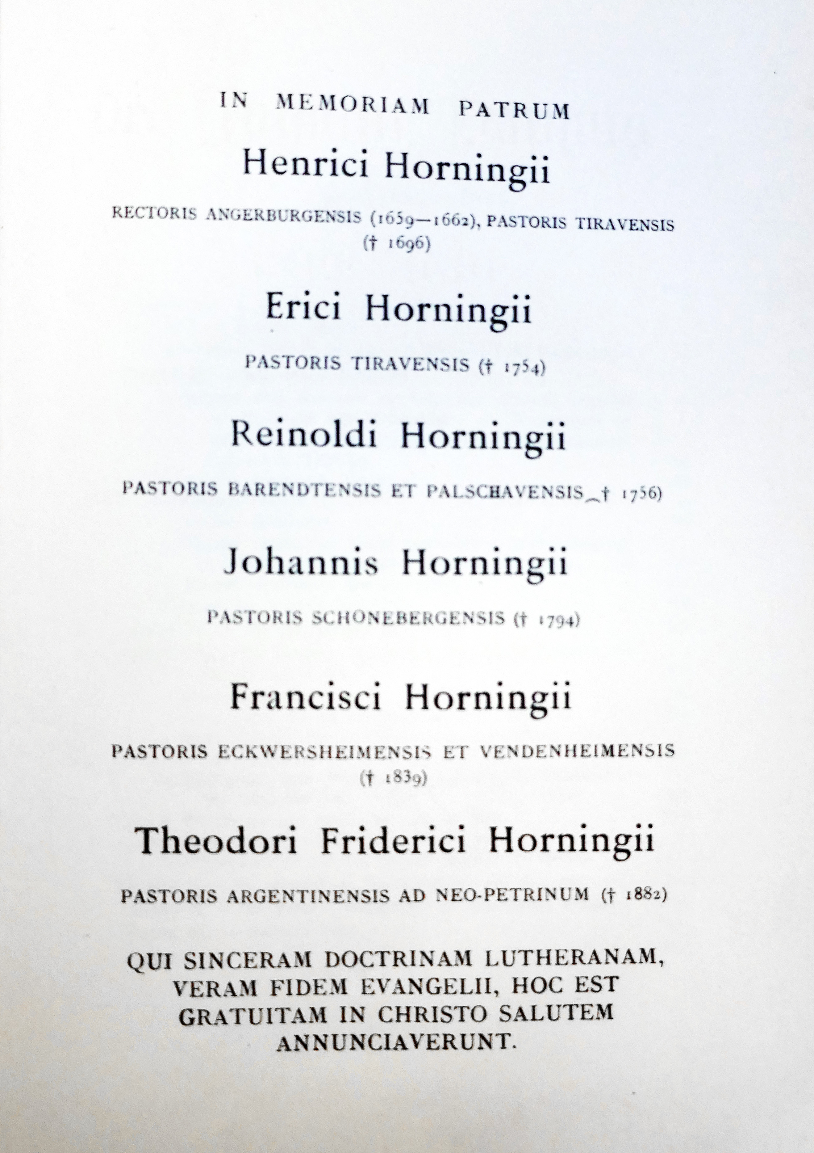 Généalogie de la famille Horning, in Wilhelm Horning, Dr. Johann Pappus von Lindau 1549-1610 Münsterprediger, Universitätsprofessor und Präsident des Kirchenkonvents zu Strasburg aus benützlen Urkunden und Manuskripten. Strasbourg : J. H. Ed. Heitz (Heitz & Mündel), 1891, 323 p., 24 cm. Médiathèque protestante de Strasbourg.